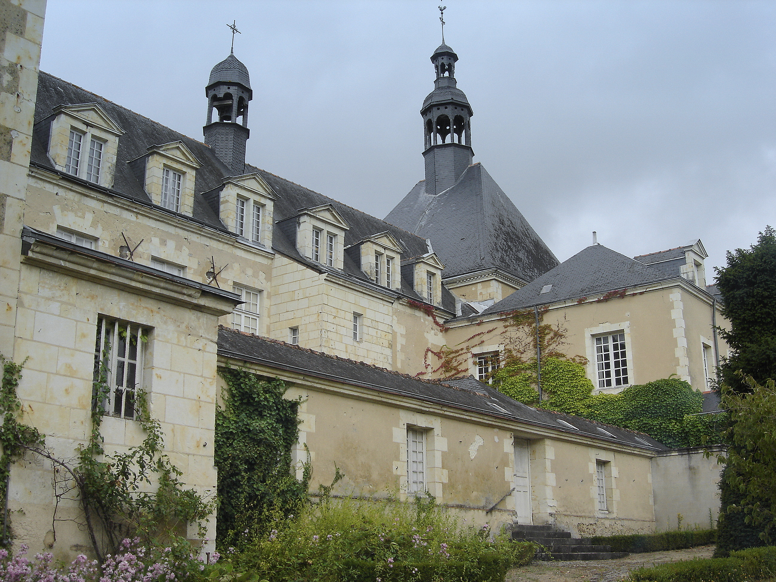 Hotel-Dieu de Baugé (Maine-et-Loire) .